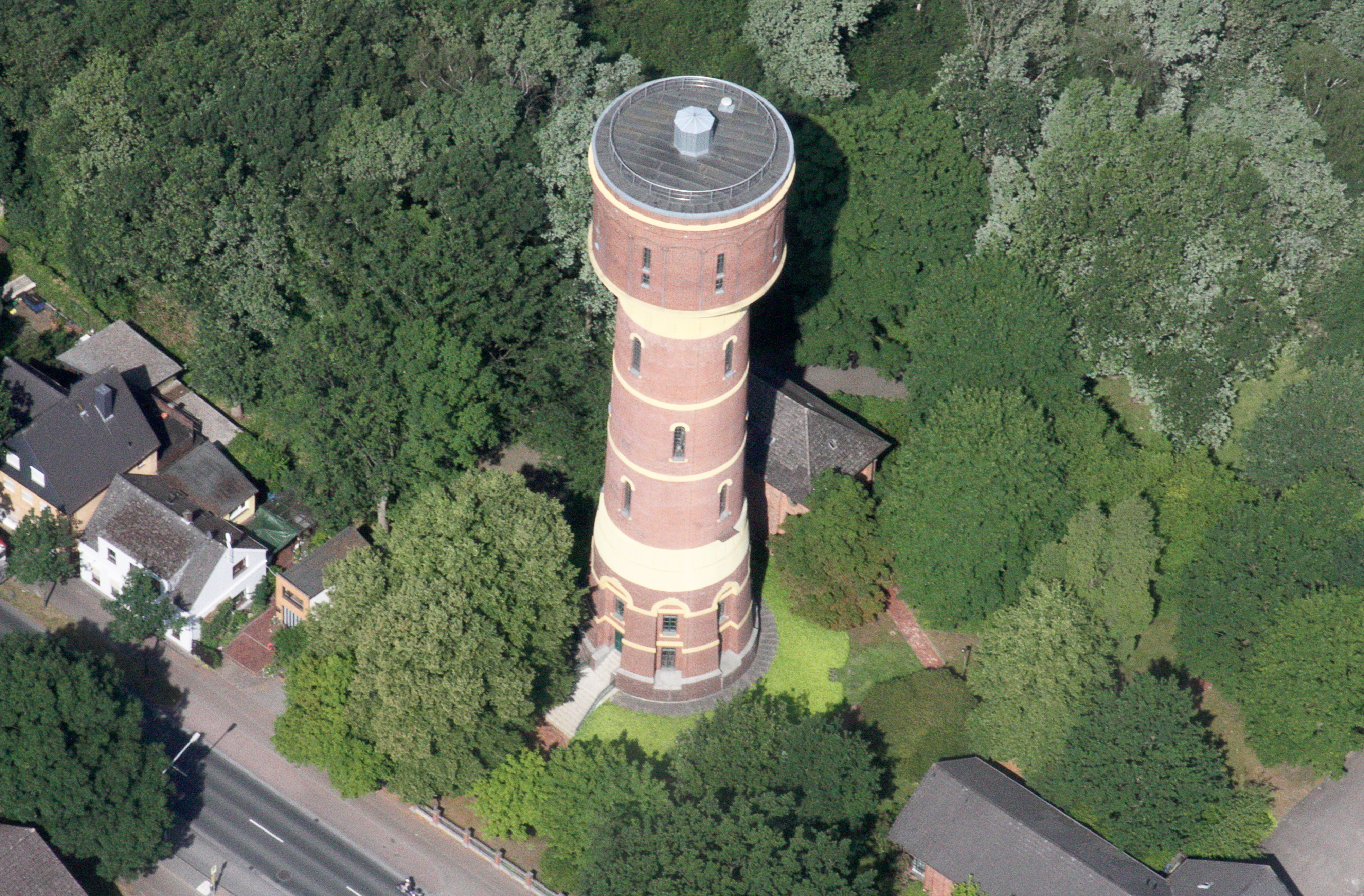 Luftaufnahmen Oldenburg (Oldenburg), mit Weiterflug nach Westen; 1500 Fuß Flughöhe; Juli 2010; Originalfoto bearbeitet: Tonwertkorrektur und Bild geschärft mit Hochpassfilter